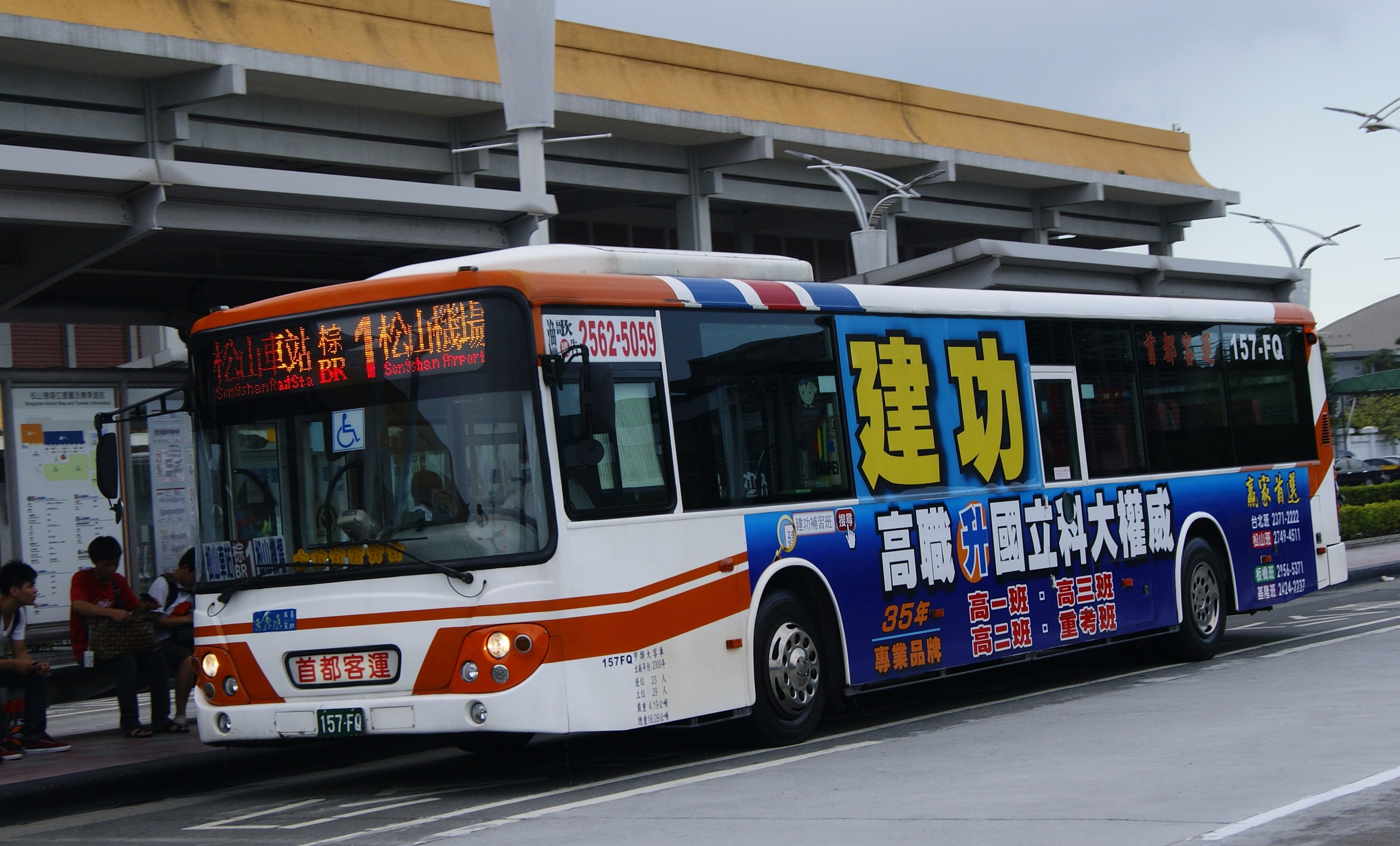 首都客運157-FQ 棕1 松山車站~松山機場